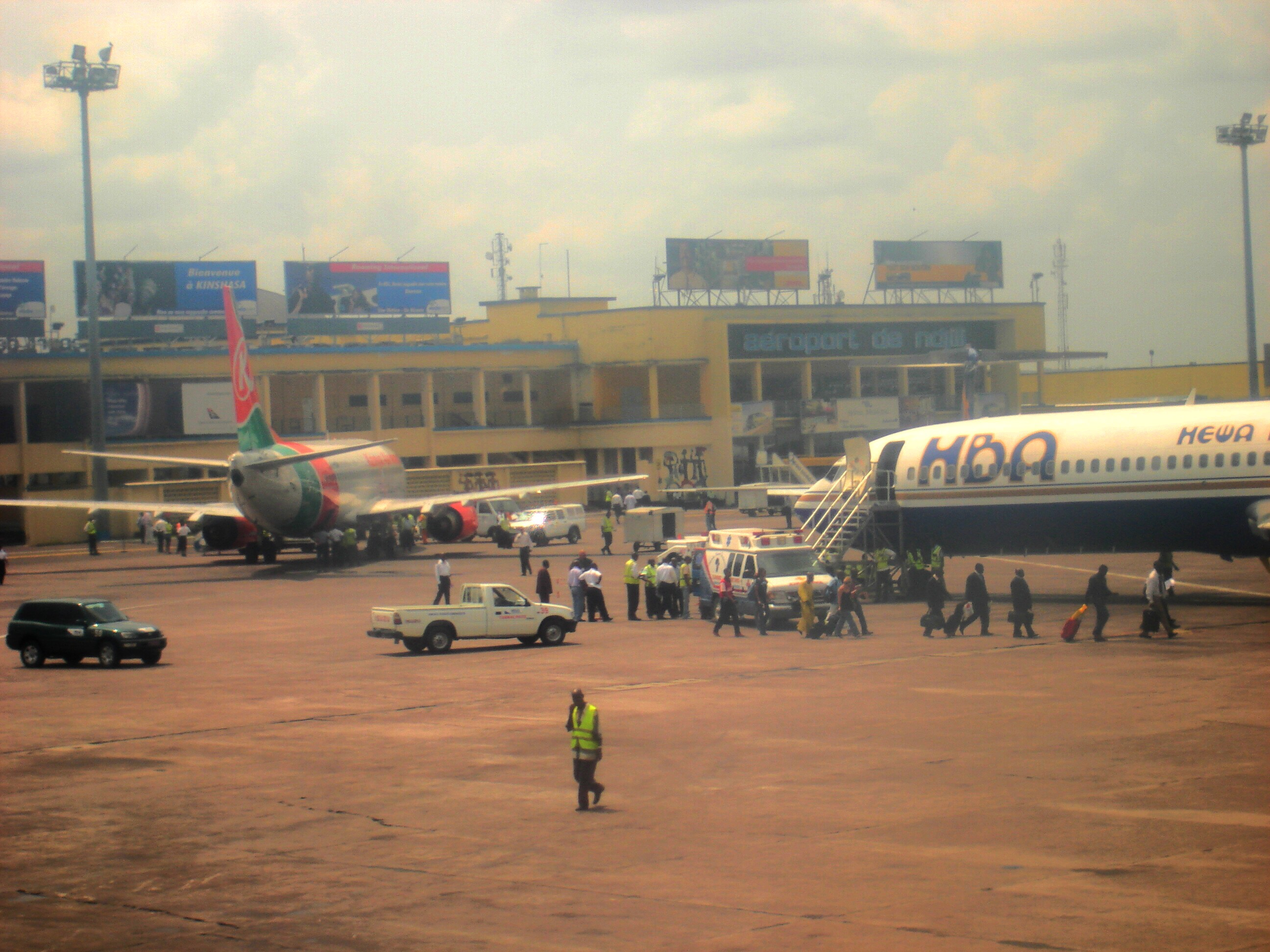 Kinshasa, aéroport de N'djili, tarmac.